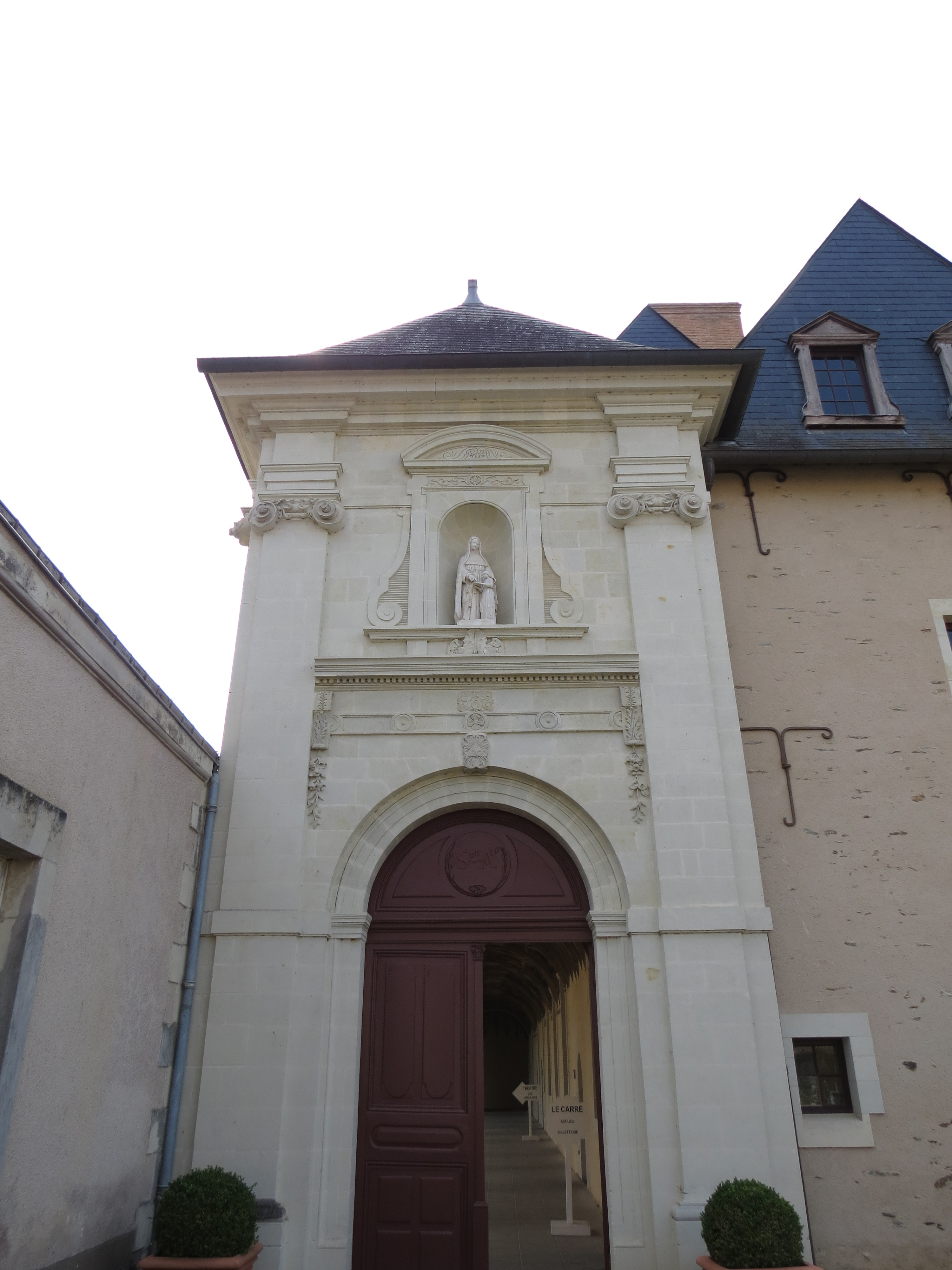 Couvent des Ursulines de Château-Gontier, Mayenne; Statue of Saint Angela Merici